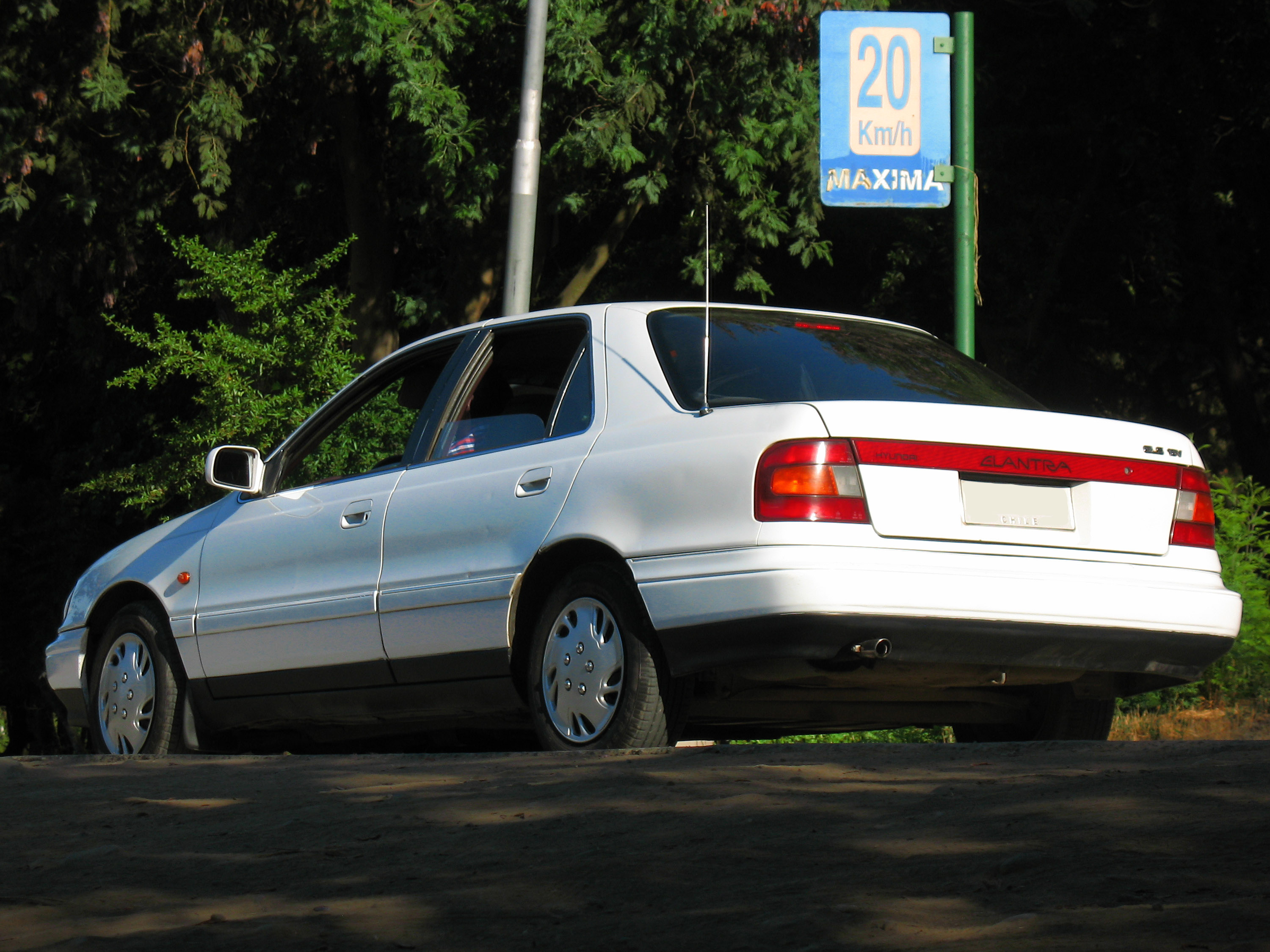 Hyundai Elantra 1.6 GLS 1992